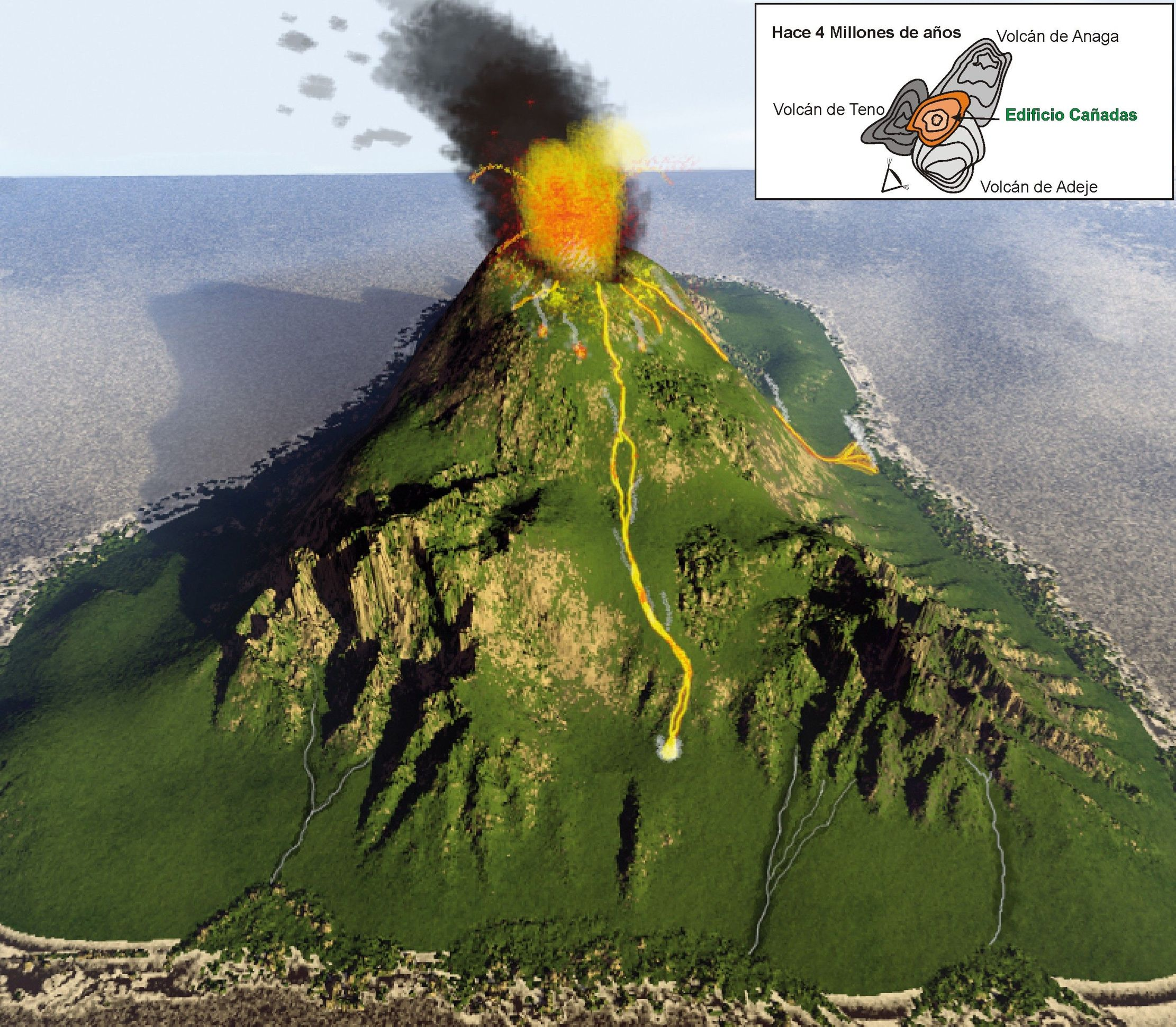 Tercera etapa de creación del Teide